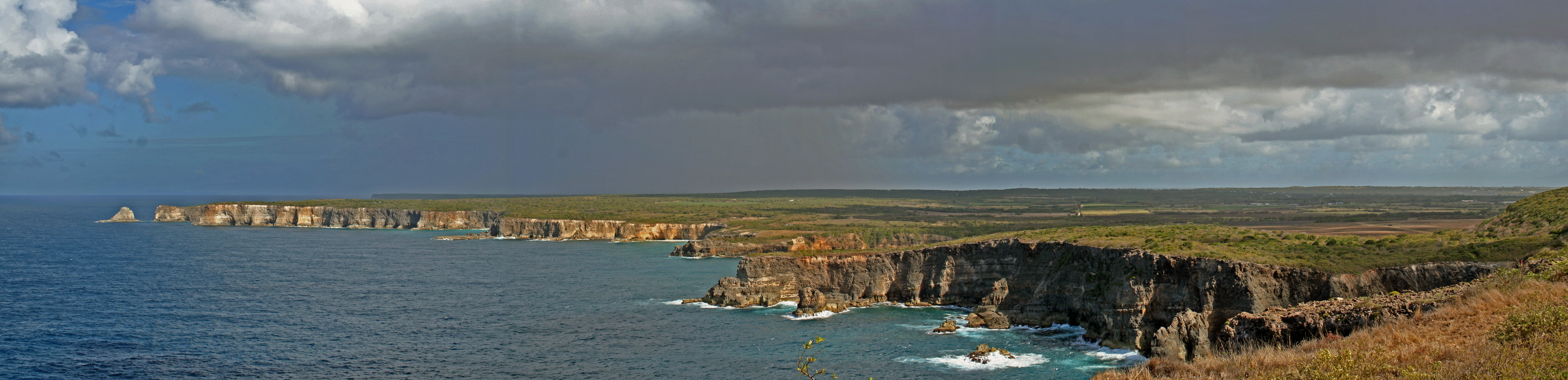 Panorama de la Pointe de la Grande Vigie au nord de la Grande-Terre, Guadeloupe.